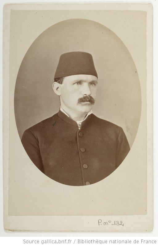 A. Synvet (Alexandre Sinvet), geographe et cartographe français.